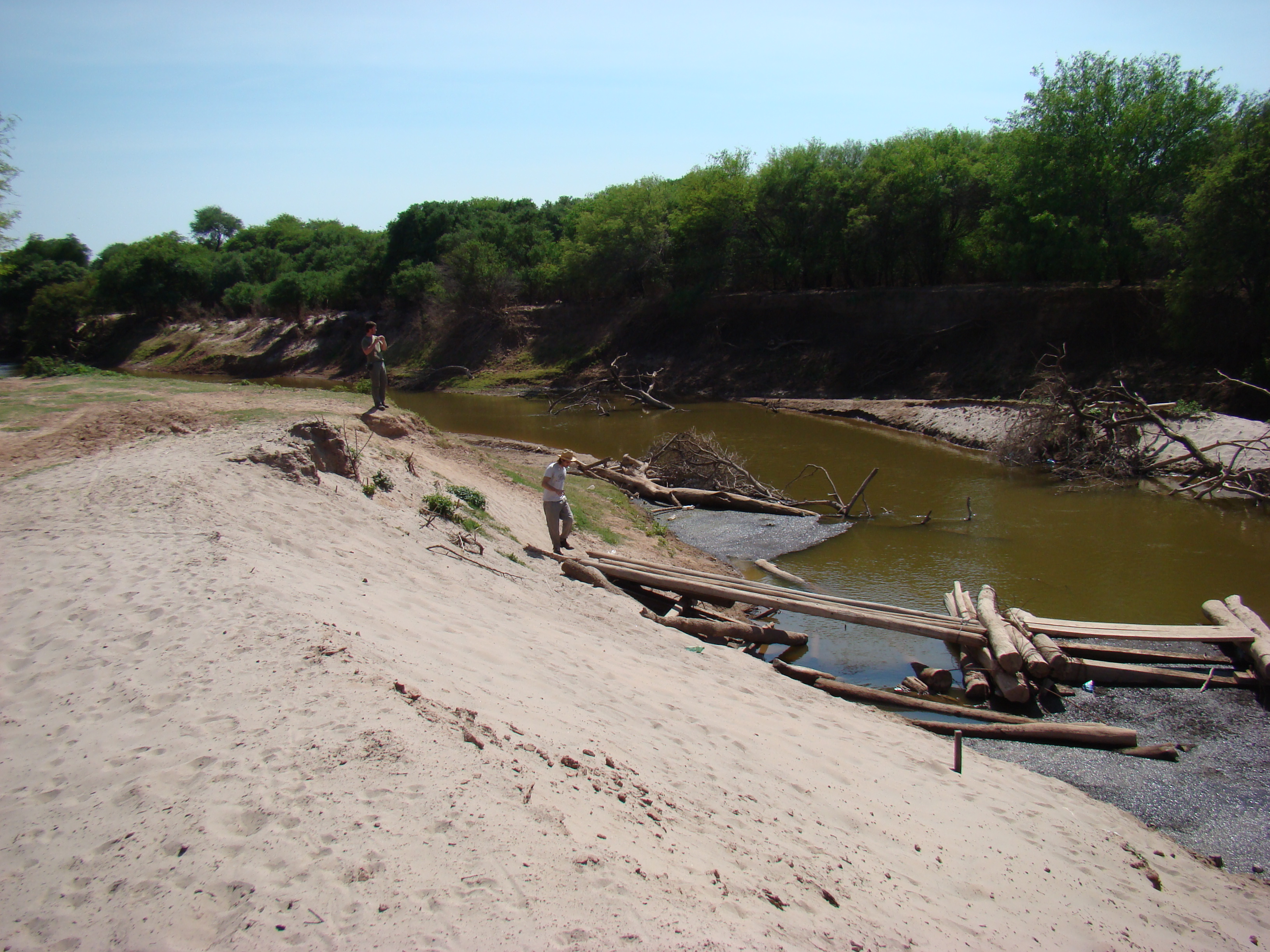 Río Teuco a pocos km de la localidad de Rivadavia Banda Sur. Puente precario destruido por la creciente del año 2008.